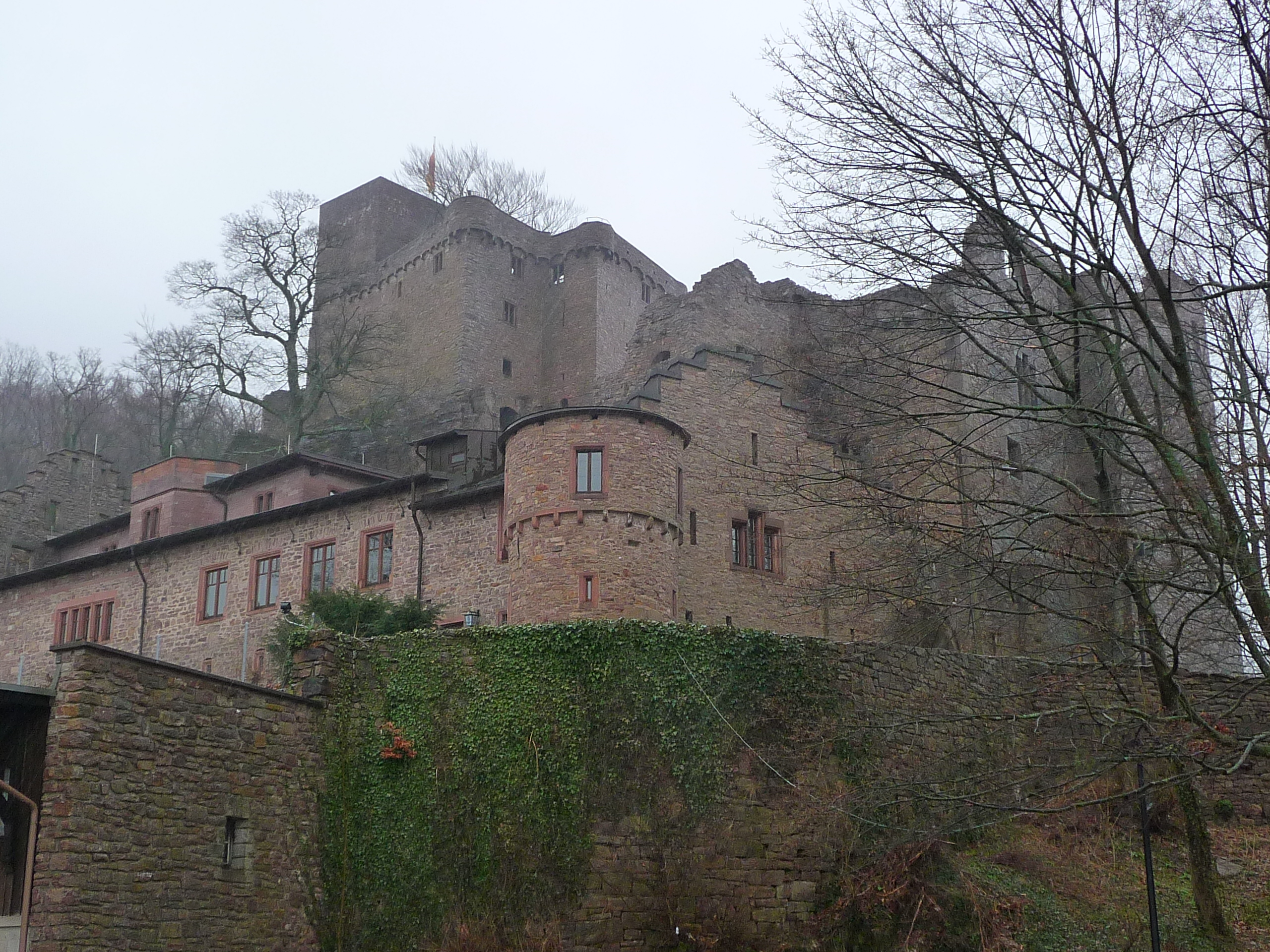 Schloss Hohenbaden (Ruine oberhalb Baden-Baden, sogenanntes Altes Schloß)